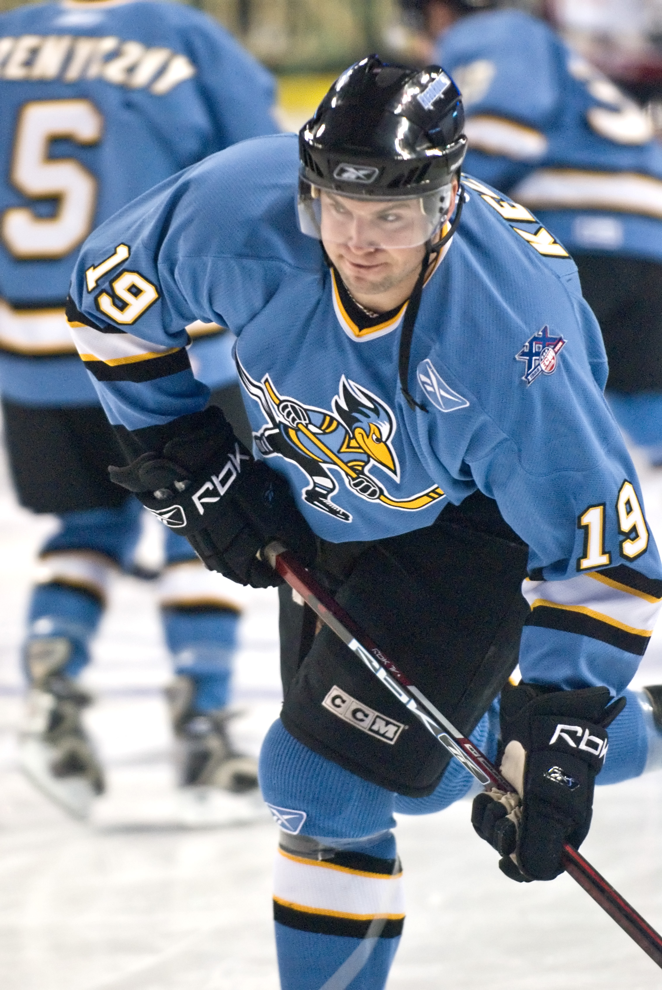 Scott Kelman